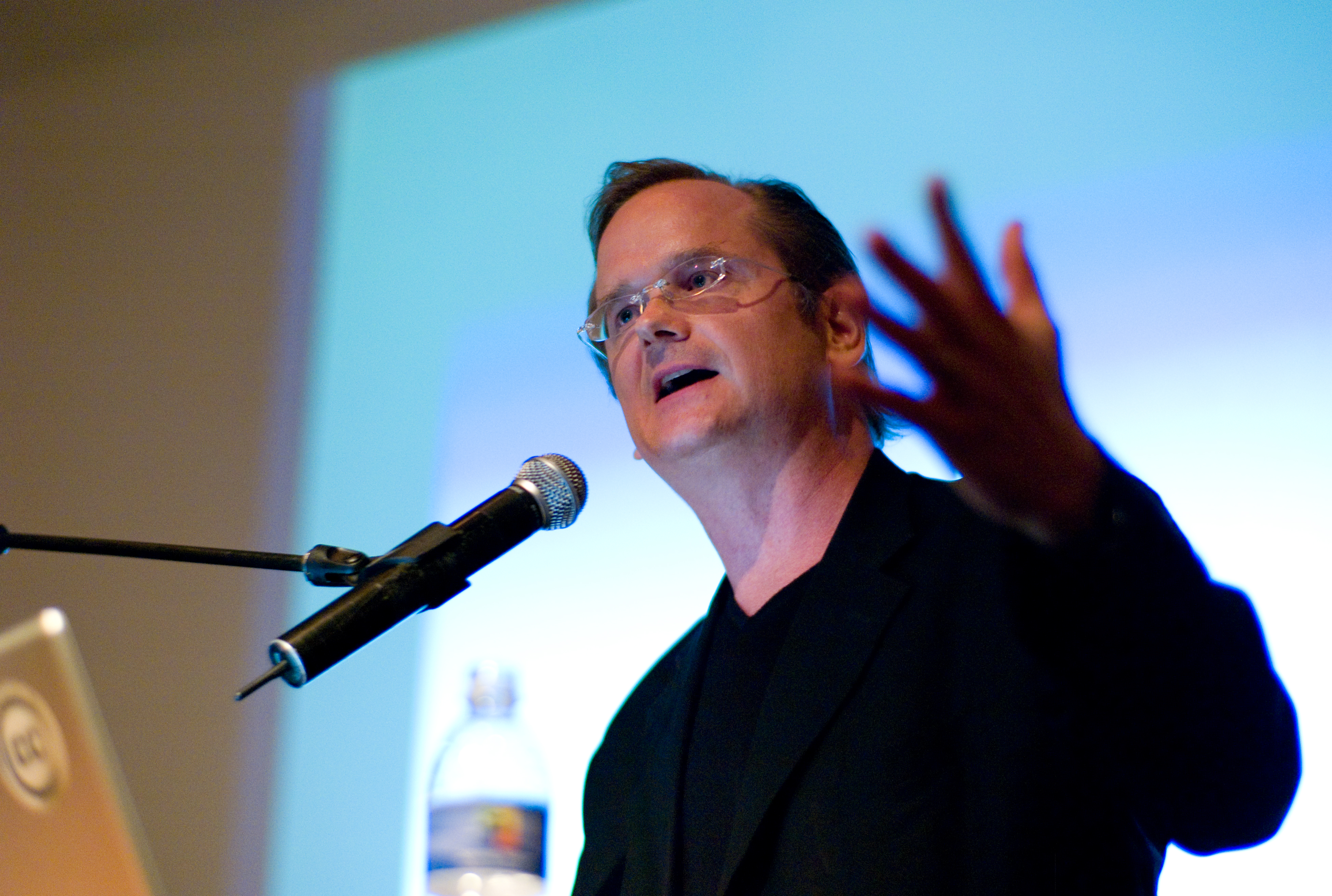 Lawrence Lessig. Klik for stort foto.